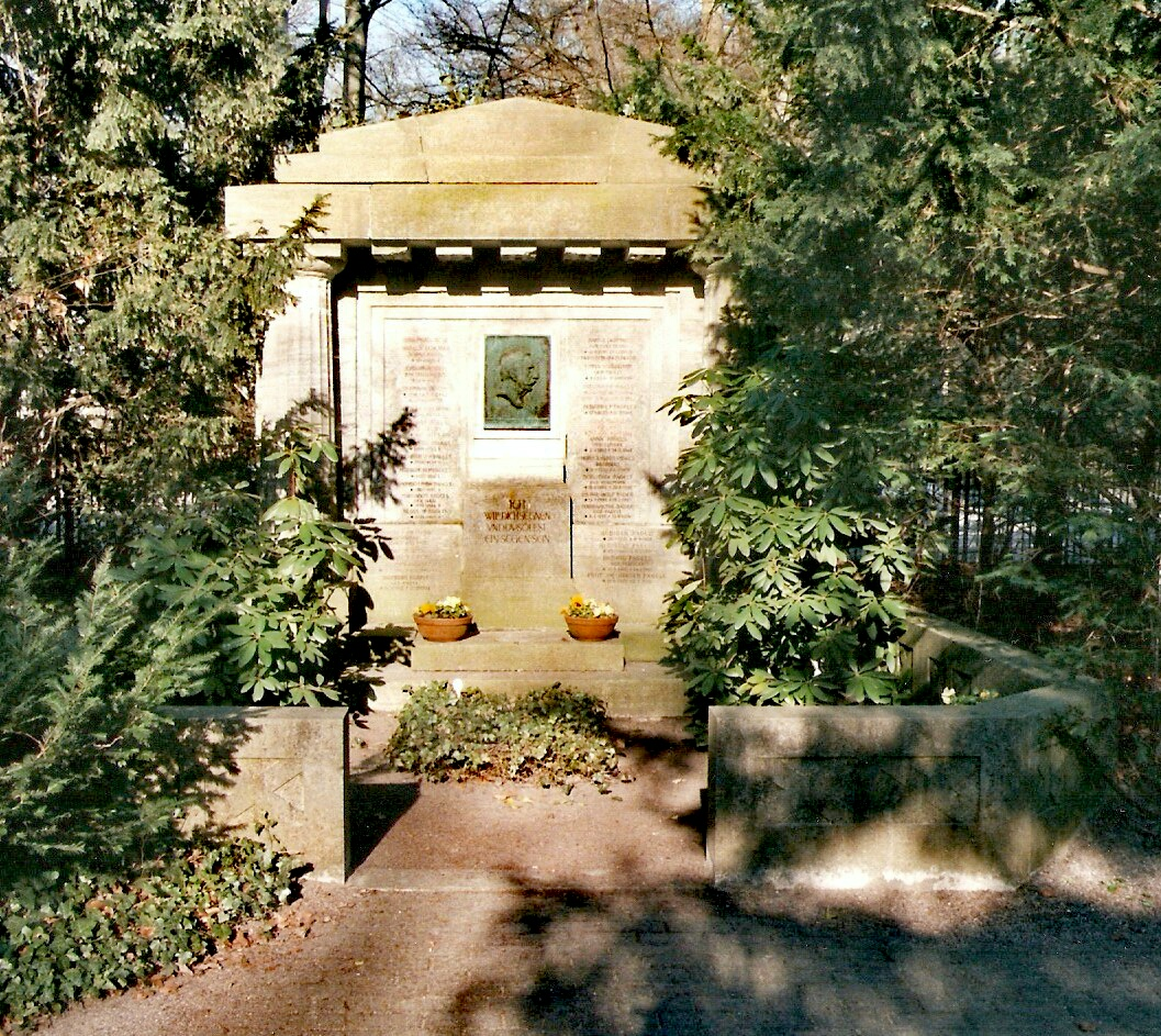 Das von Hermann Joachim Pagels geschaffene Familiengrab; Inschrift: ICH / WILL DICH SEGNEN / UND DU SOLLST / EIN SEGEN SEIN